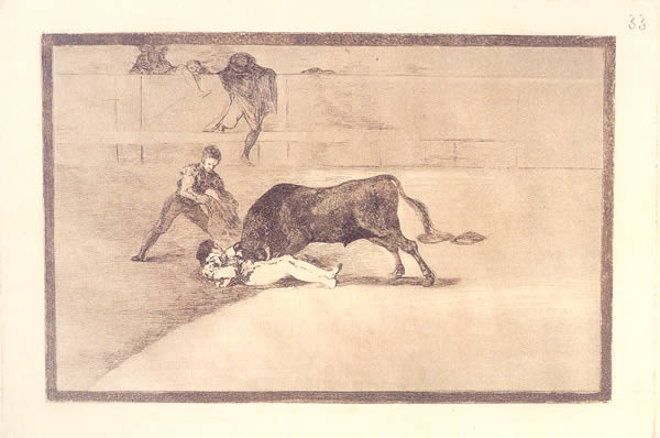 La desgraciada muerte de Pepe Illo en la plaza de Madrid. Grabado nº 33 de la serie La Tauromaquia de Goya.